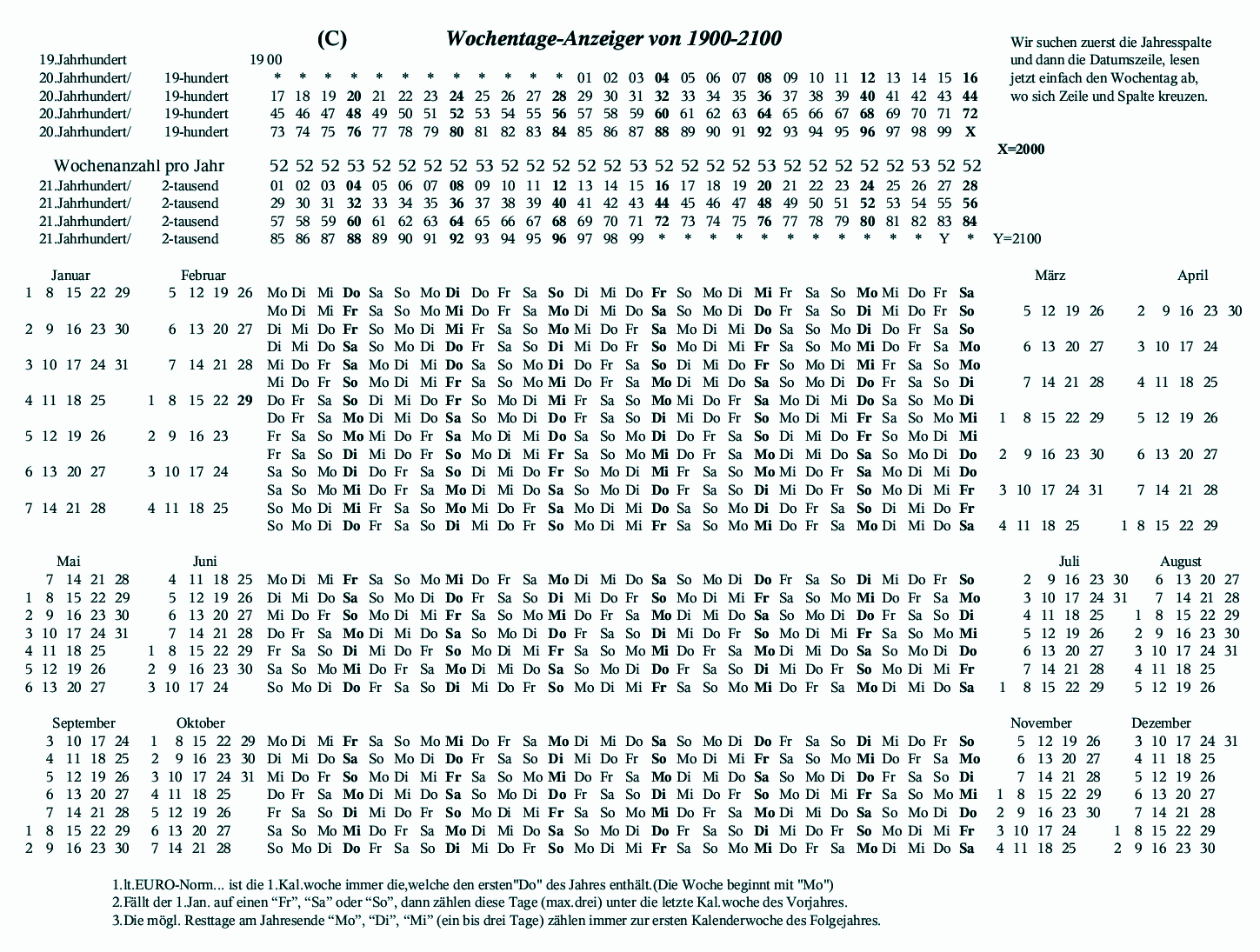 Kalenderwochenzuordnung